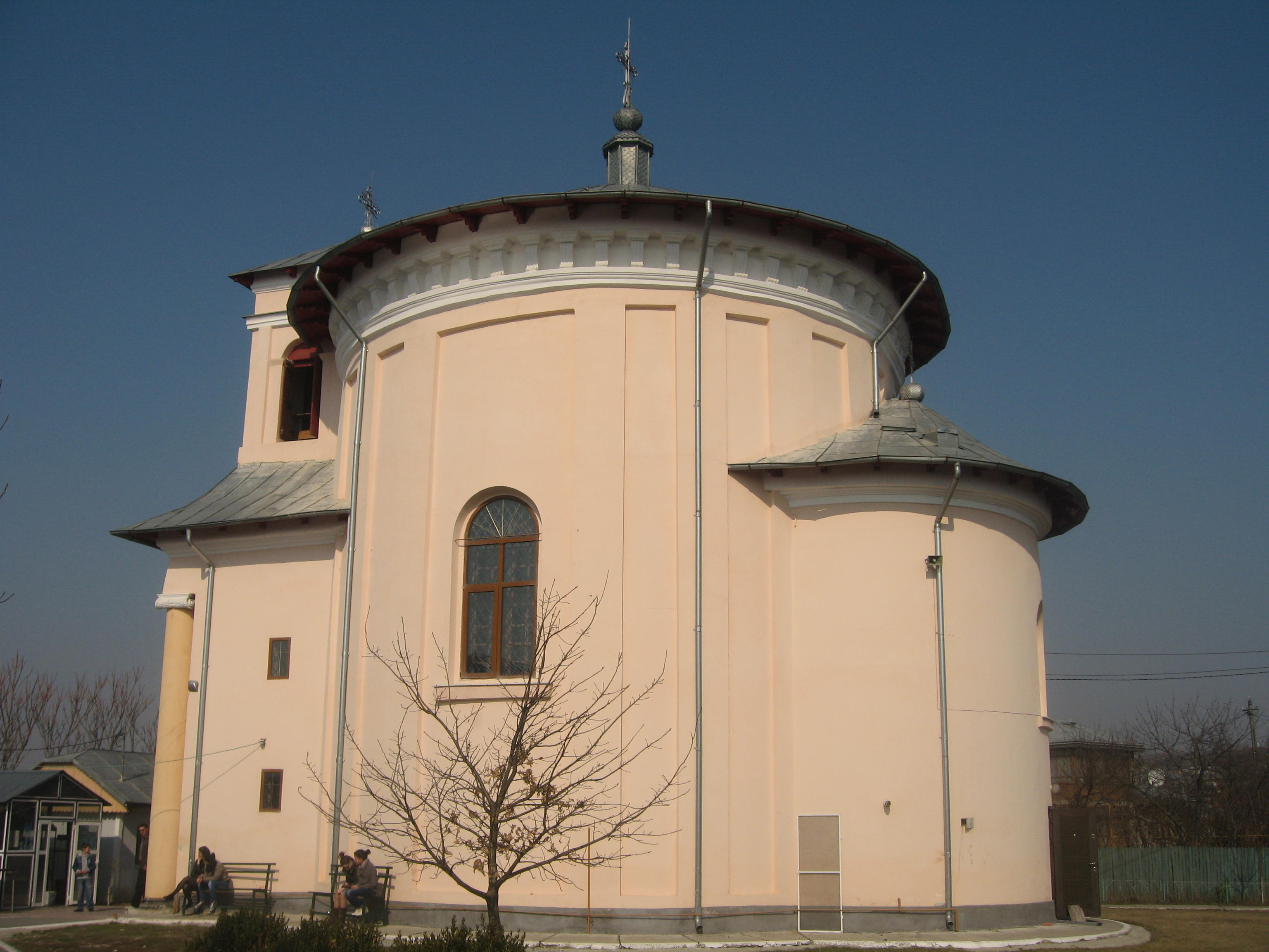 Biserica rotundă din Leţcani